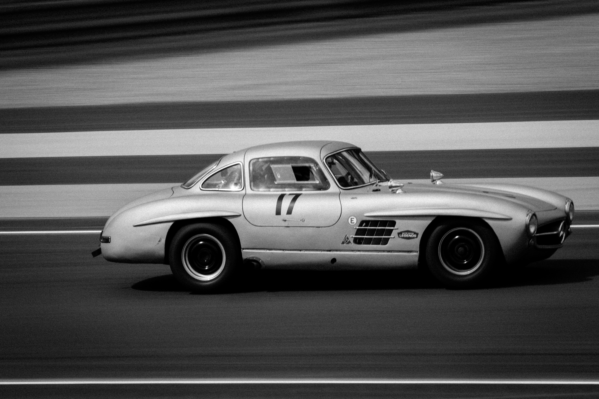 Le Mans Legend 2015 Driver: Graf Joachim Von Flinkenstein